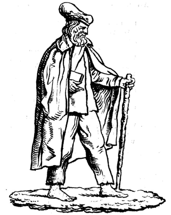 Afbeelding uit Chrysostomus Dudulaeus, Warhafftige Contrafactur, aller Gestalt vnnd Massen zusehen, dise Bildnuss von einem Juden von Jerusalem, Ahasvervs gennant, welcher fürgibt, wie das er bey der Creutzigung Jesu Christi gewesen, vnnd bisshero von Gott beim Leben erhalten worden. Sampt einer theologischen Erinnerung an den Christlichen Leser, mit glaubwürdigen Histori Exempeln illustriert vnd vermehrt (Augspurg: Sara Mangin, Wittib in Verlegung Wilhelm Peter Zimmermen Kupfferstecher), 1618